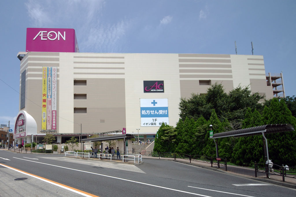 イオン板橋ショッピングセンター外観